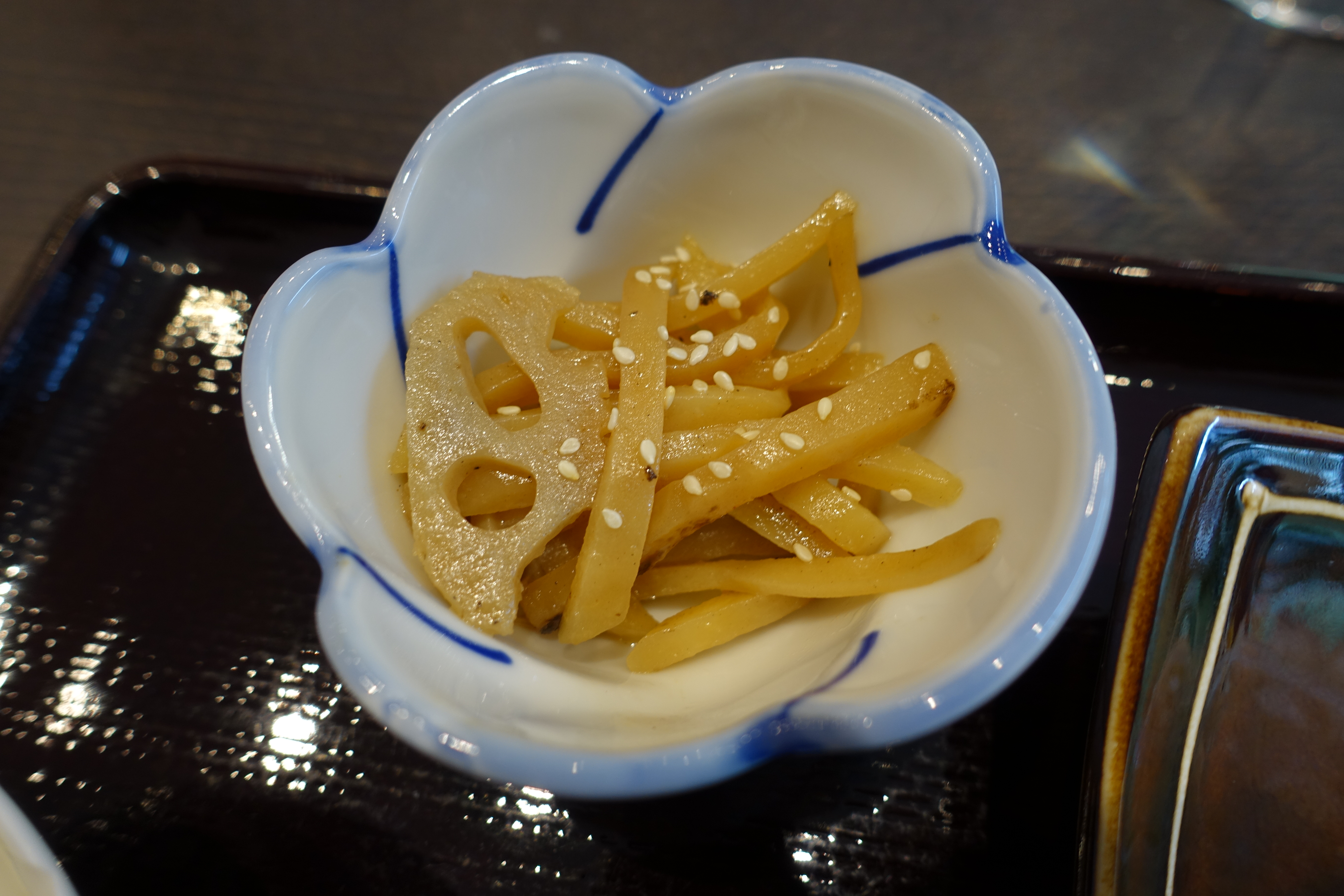 Side dish @ Tonkatsu Menu @ Tonkatsu Tombo @ Montparnasse @ Paris